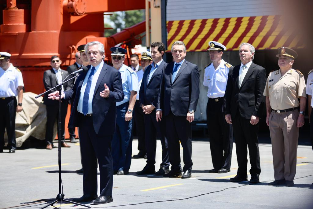 El Canciller Solá acompañó al Presidente Alberto Fernández durante el acto en el Rompehielos Almirante Irízar